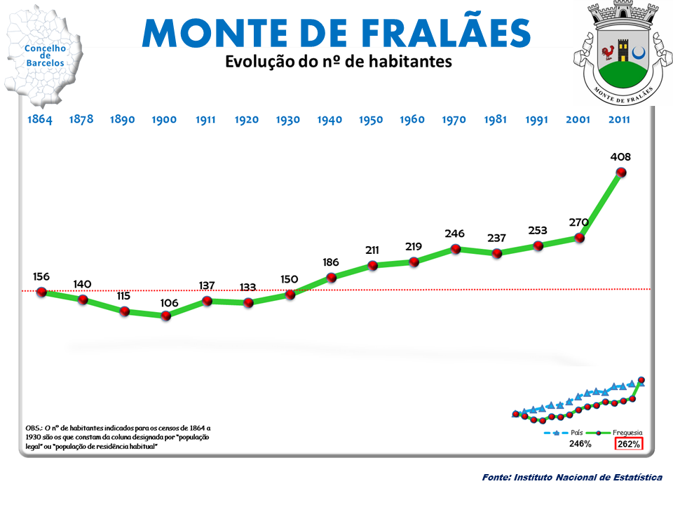 Cenos 1864/2011